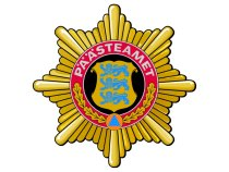 Paasteameti vapp